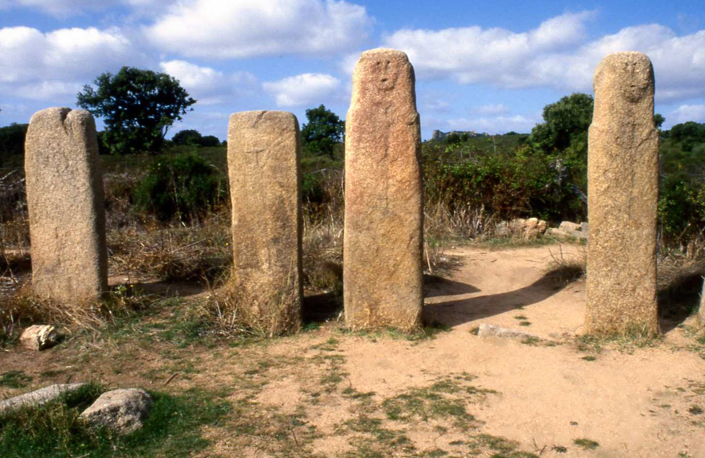 Stanydale